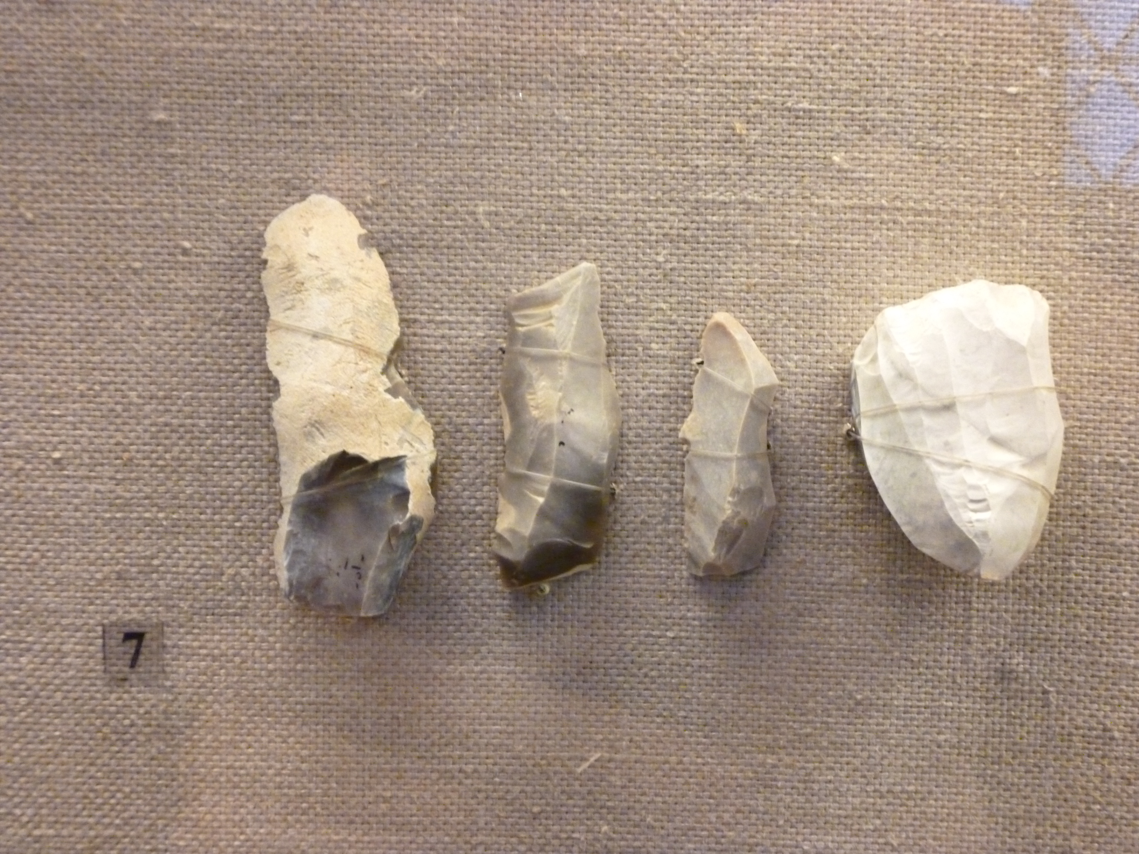 Нуклеус и ребристые сколы. Стоянка Каменная Балка II, Третий мыс (Ростовская область). Государственный исторический музей.